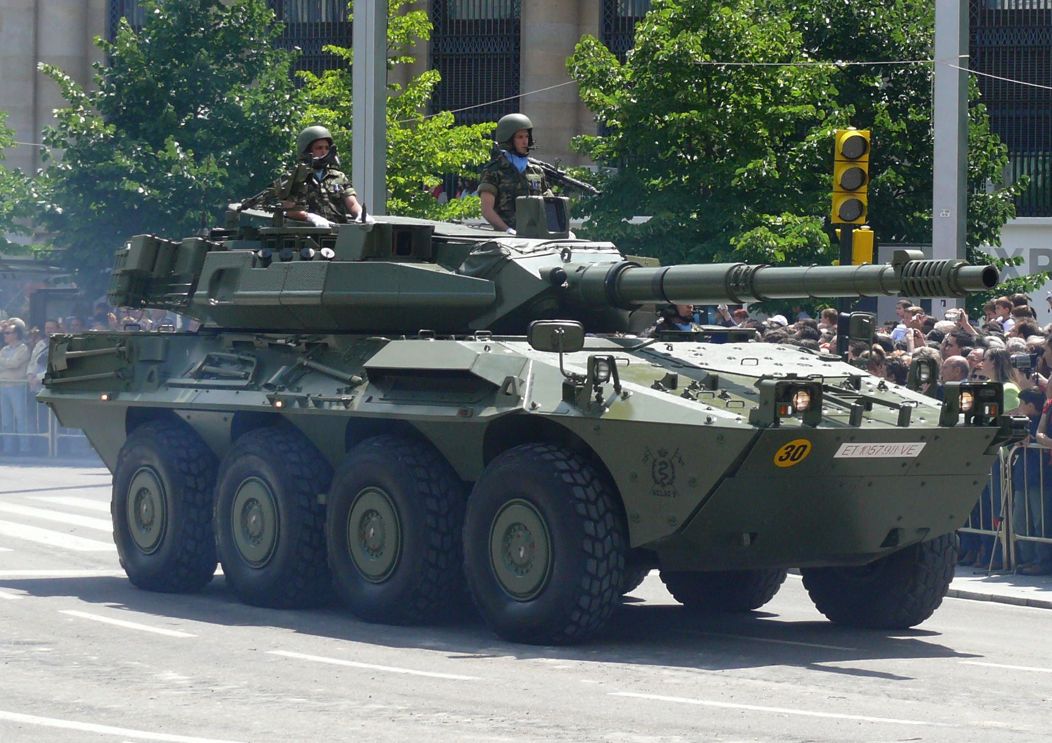 Un Centauro del Ejército de Tierra de España en el desfile del día de las Fuerzas Armadas de España del 2008 en Zaragoza.